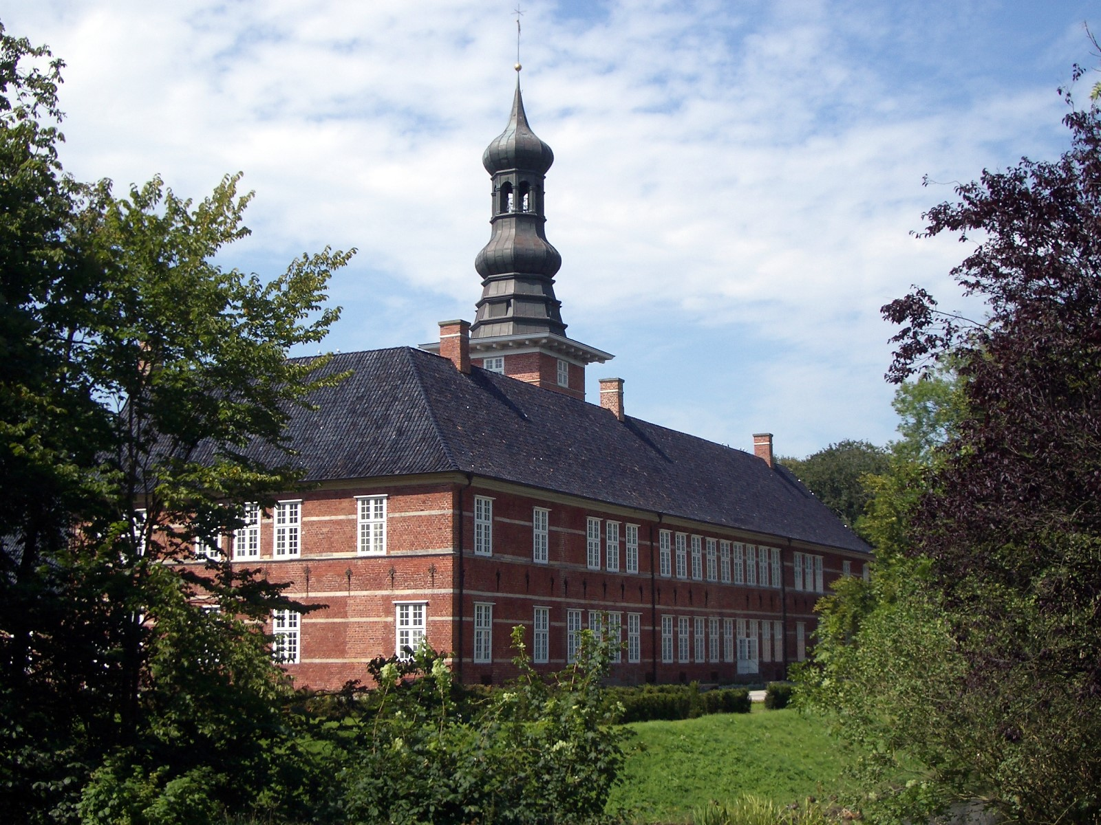 Schloss vor Husum: Blick auf den Ostflügel mit dem rekonstruierten Barockgarten.